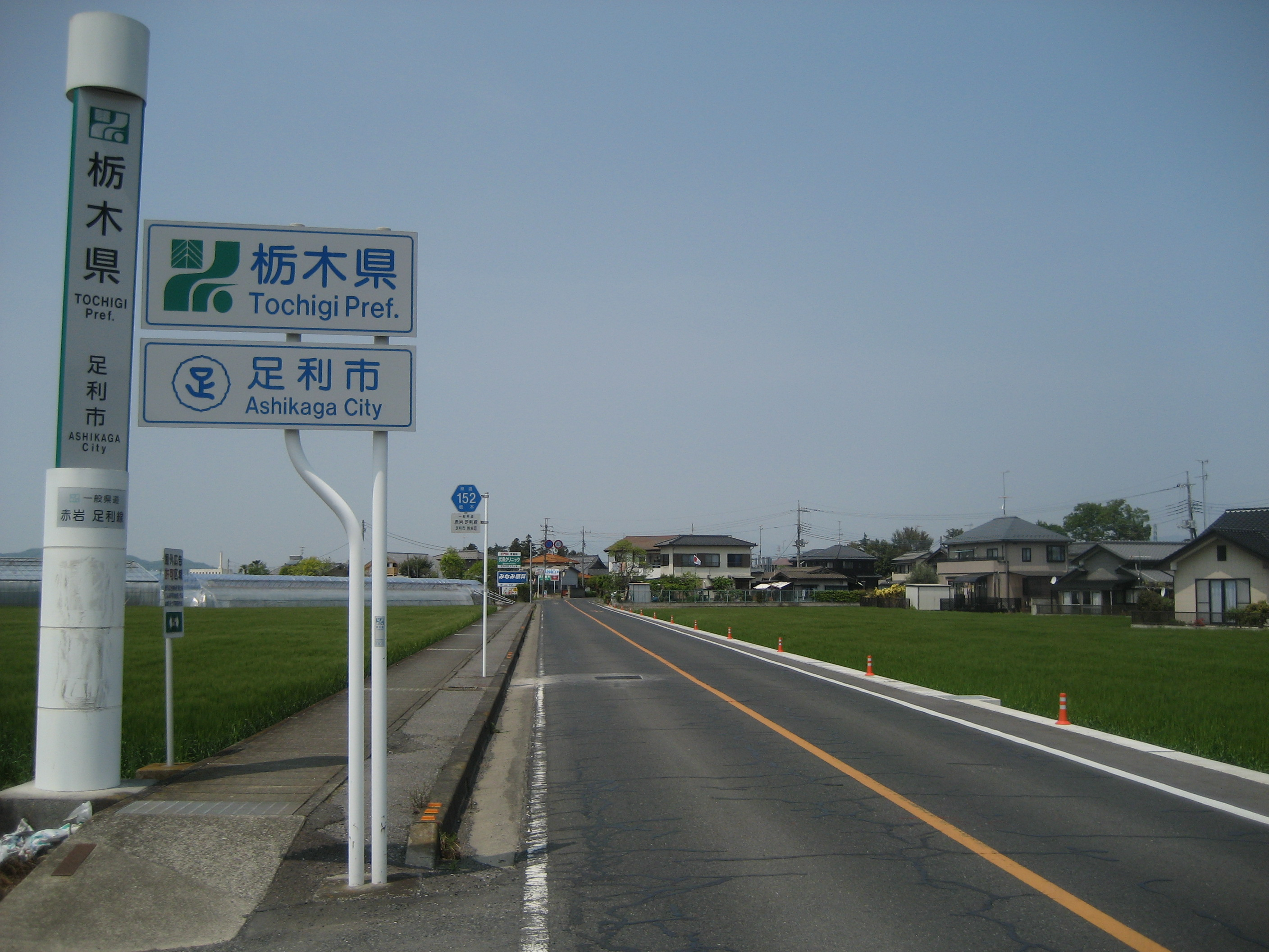 栃木県道152号線足利市荒金町付近